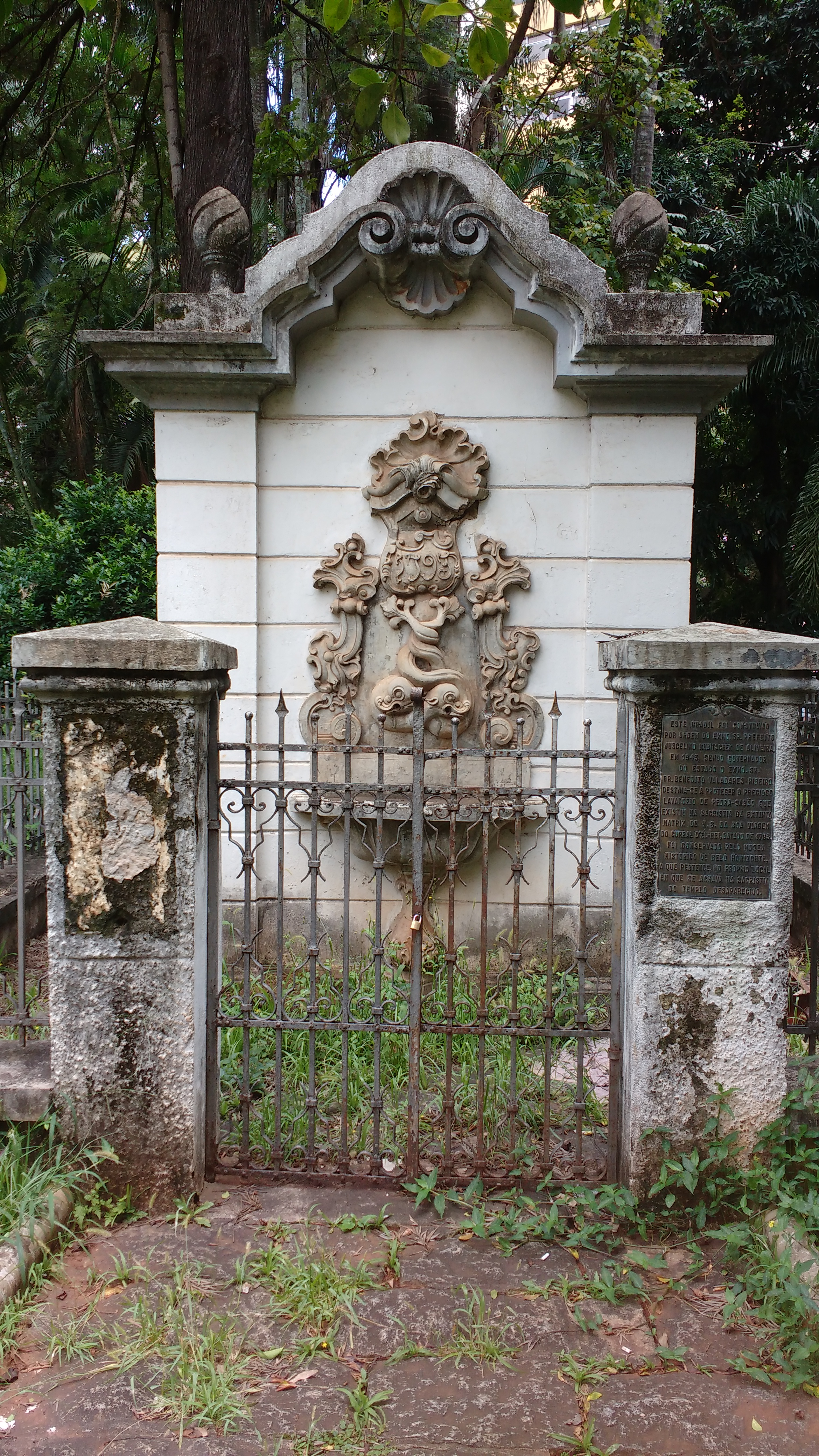 Lavatório de pedra-sabão ao lado da Paróquia Nossa Senhora da Boa Viagem, em Belo Horizonte.